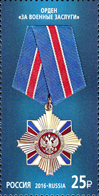 Российская почтовая марка «За военные заслуги» (2016).